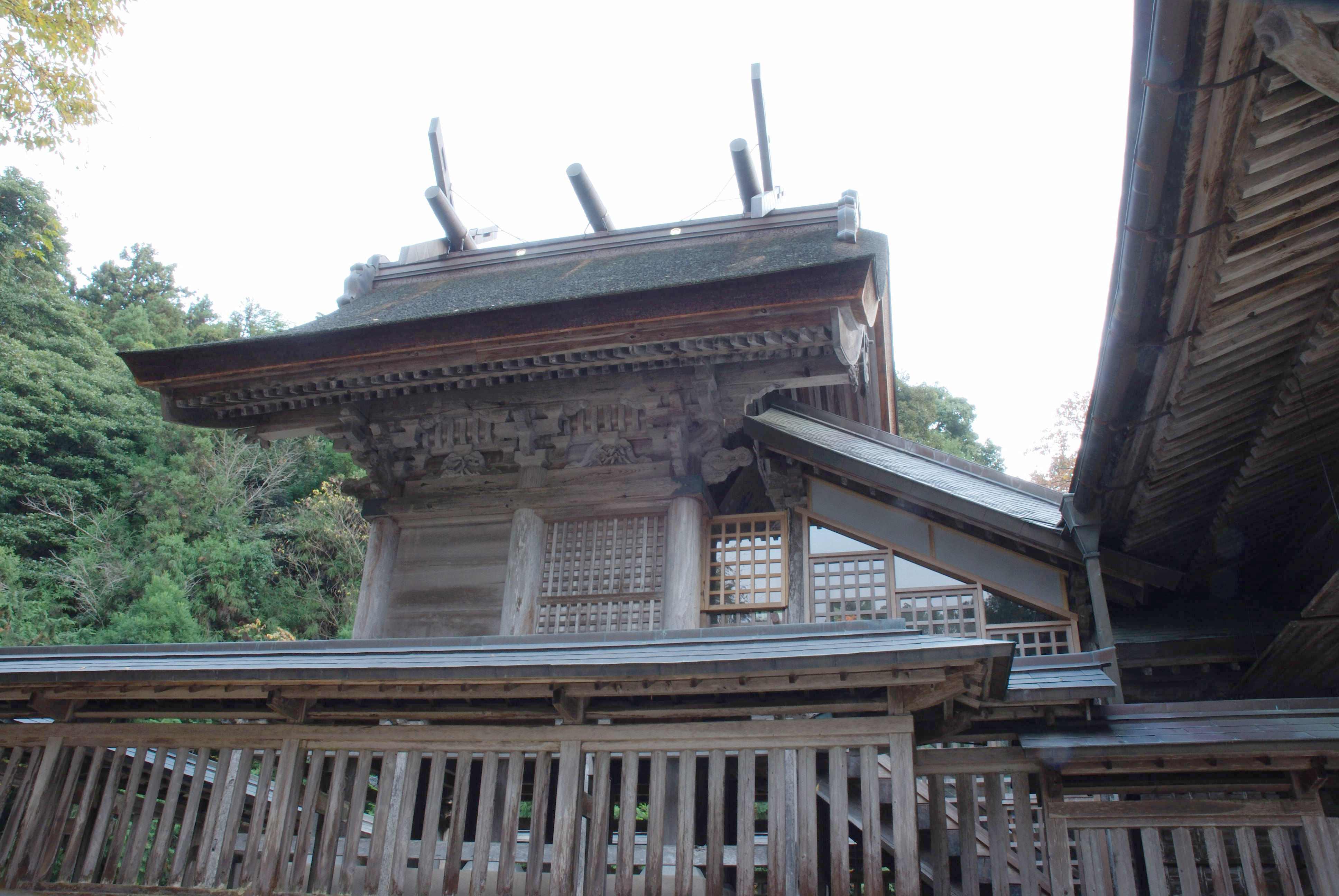 Tamatsukuriyu jinja